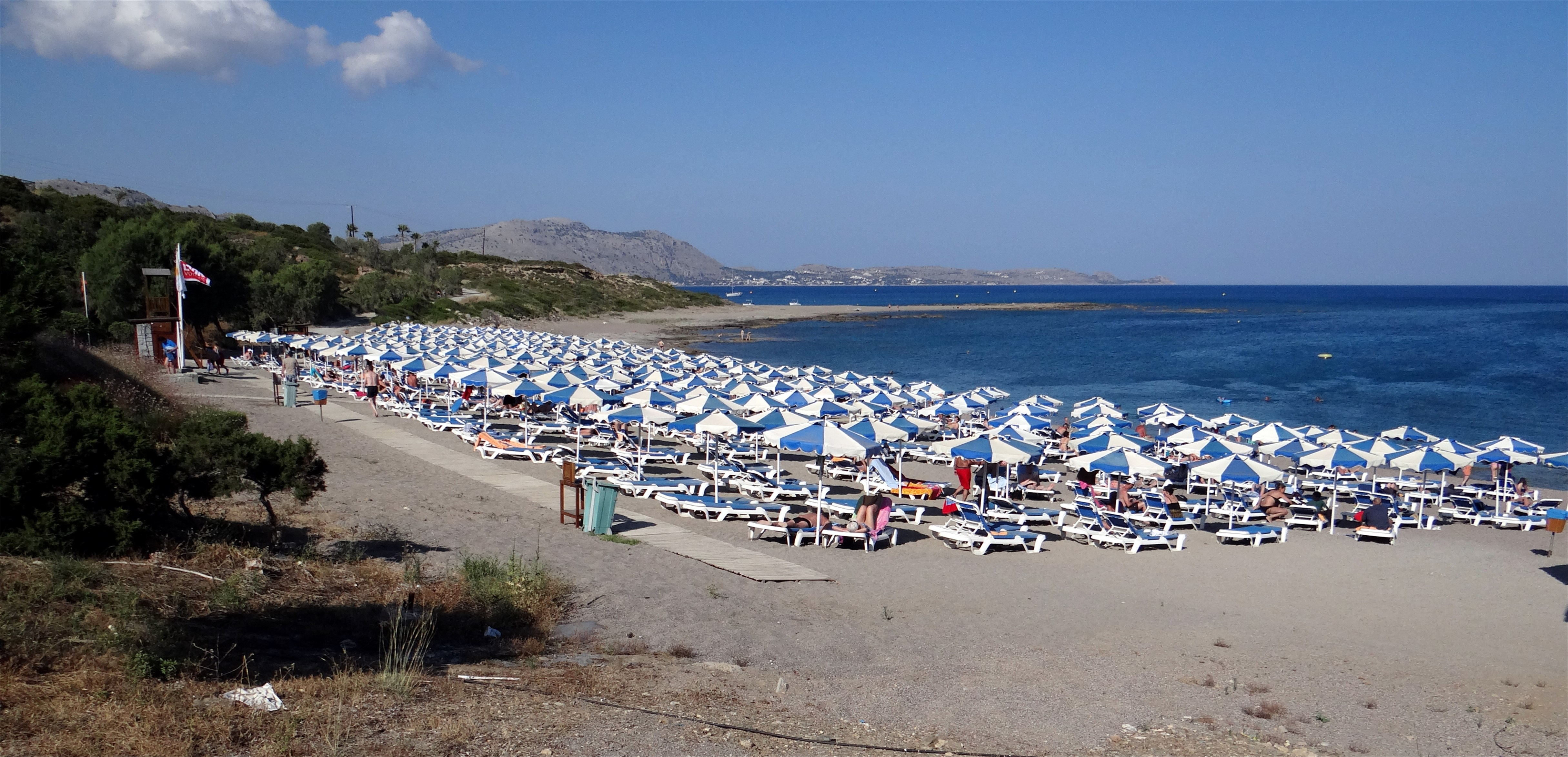 La plage de Kiotari, Rhodes, Grèce.